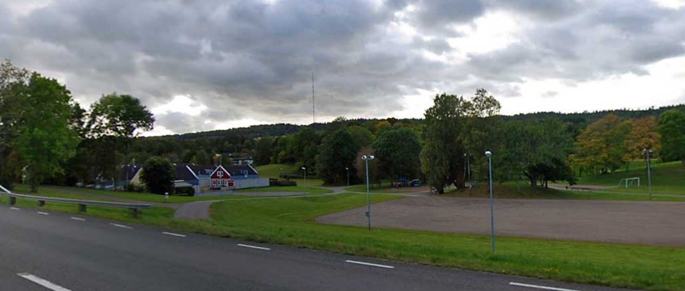 Ulveket i Skövde sett från Karstorpsvägen